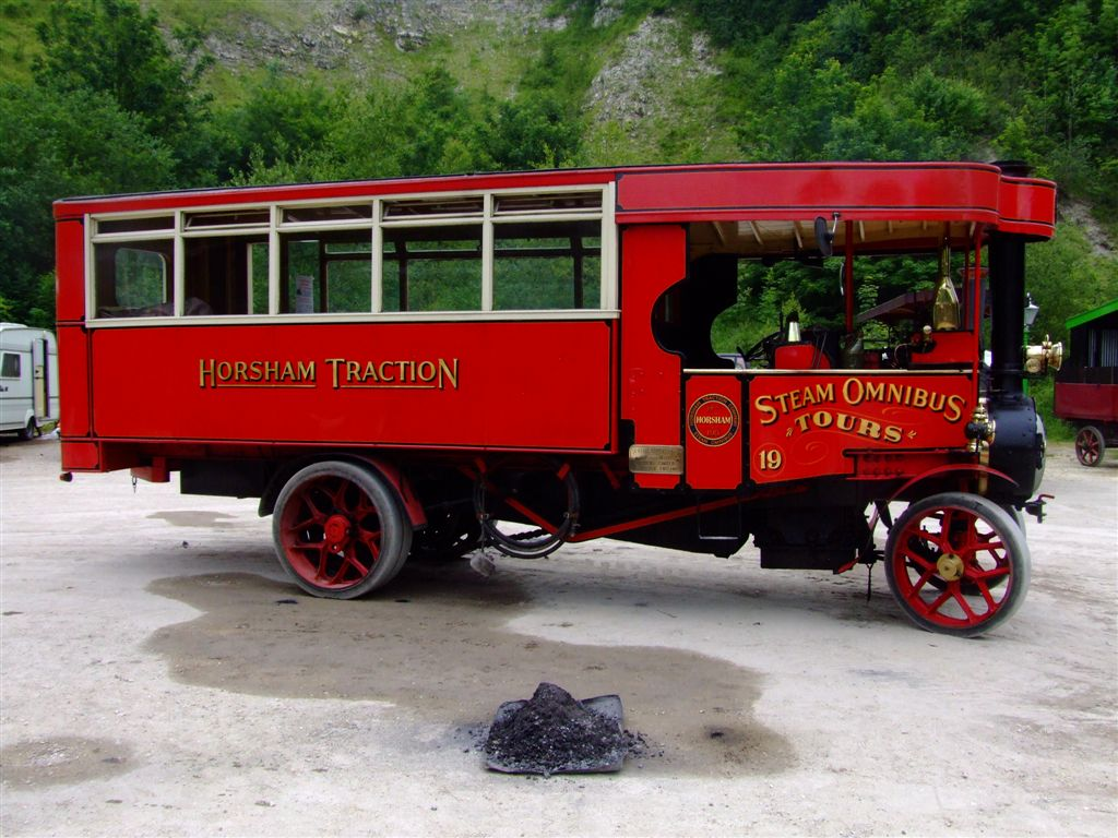 Again!